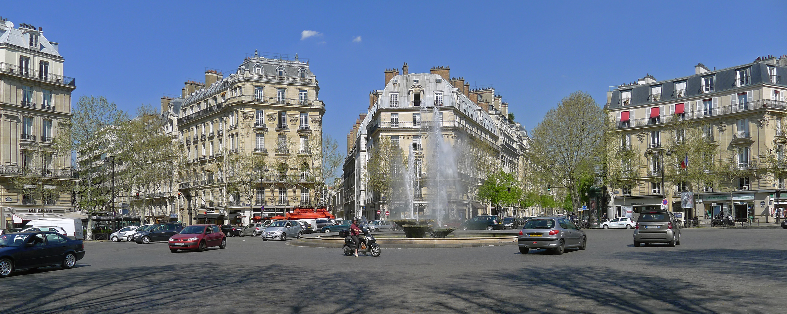 Place Victor-Hugo - Paris XVI